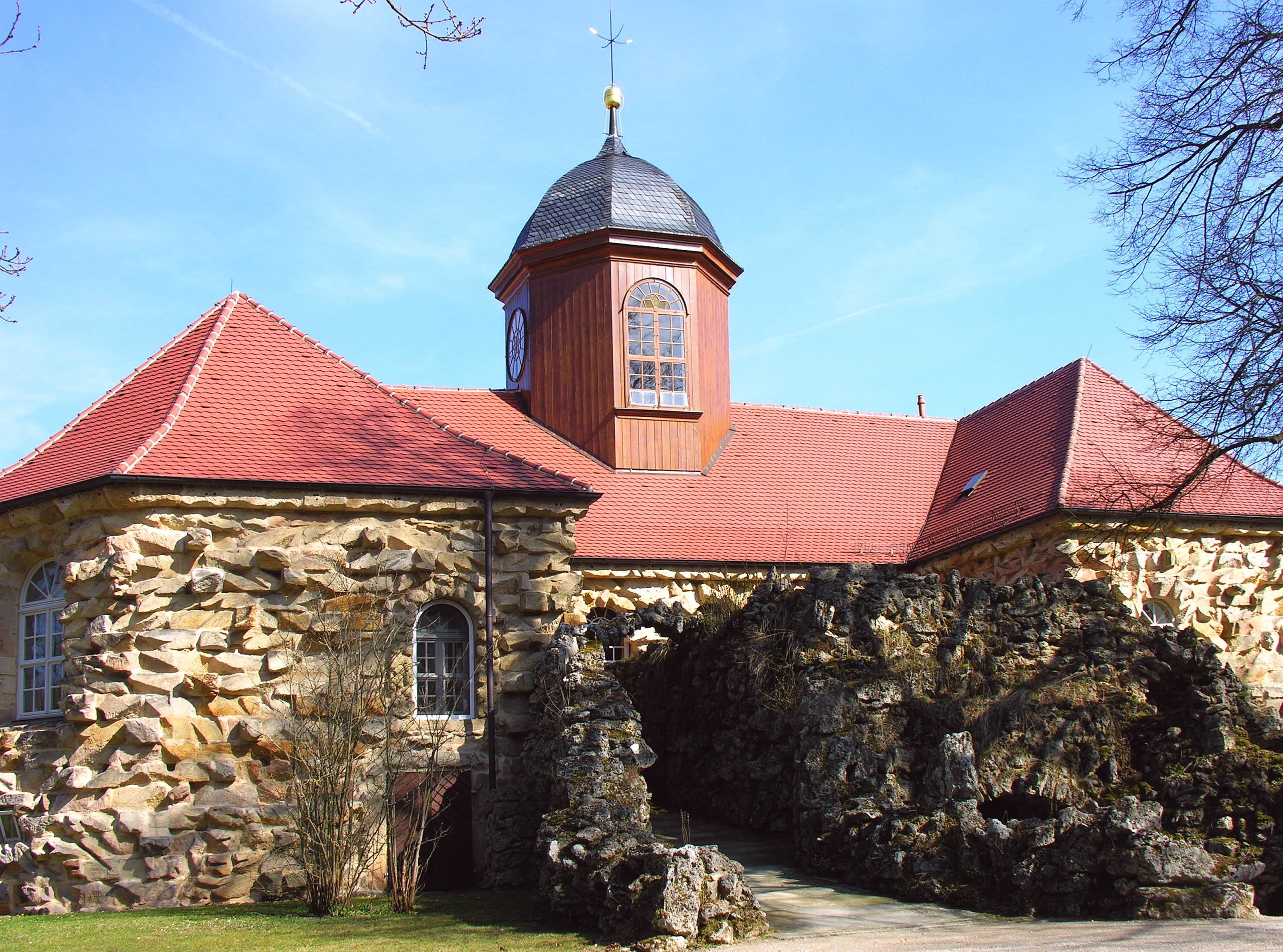 Eremitage von Bayreuth: Das alte Schloss 1719-22 von der Eingangsseite - exterior - Foto Wolfgang Pehlemann DSCN7083